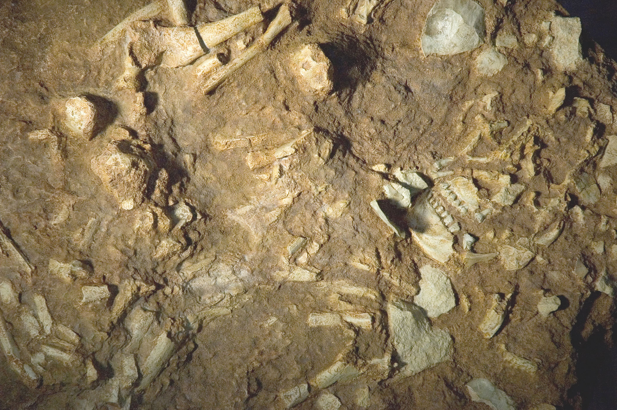 Reconstitution du squelette de Pierrette, découvert en 1979 au gisement archéologique "La Roche à Pierrot", Paléosite